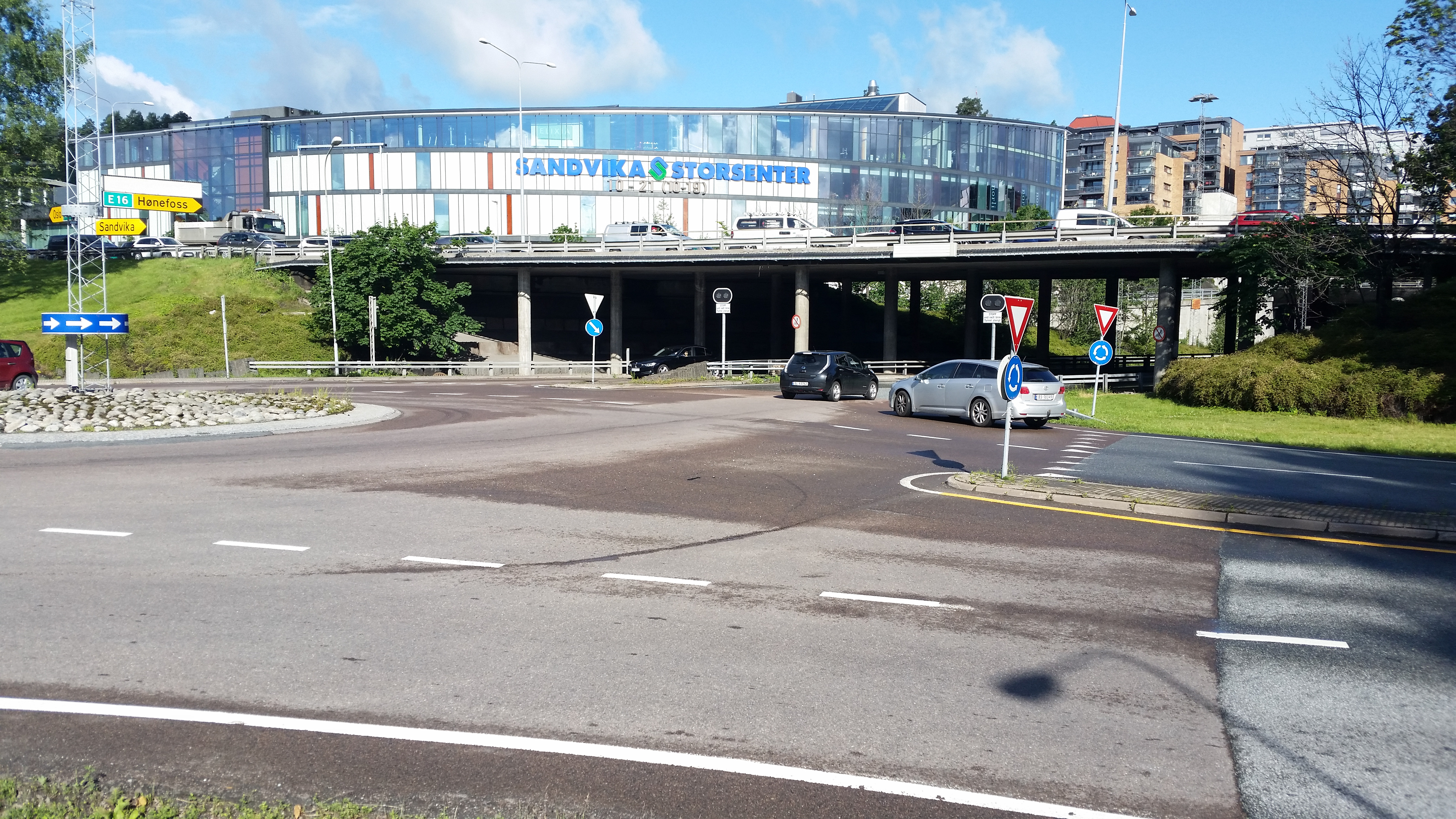 Sandvika storsenter. E18 oppå brua. Inngangen til E16 Kjørbotunnelen under brua til høyre.